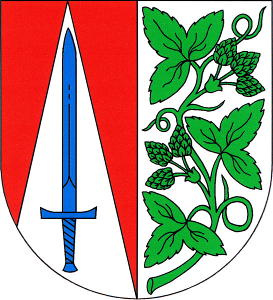 Znak obce Liběšice